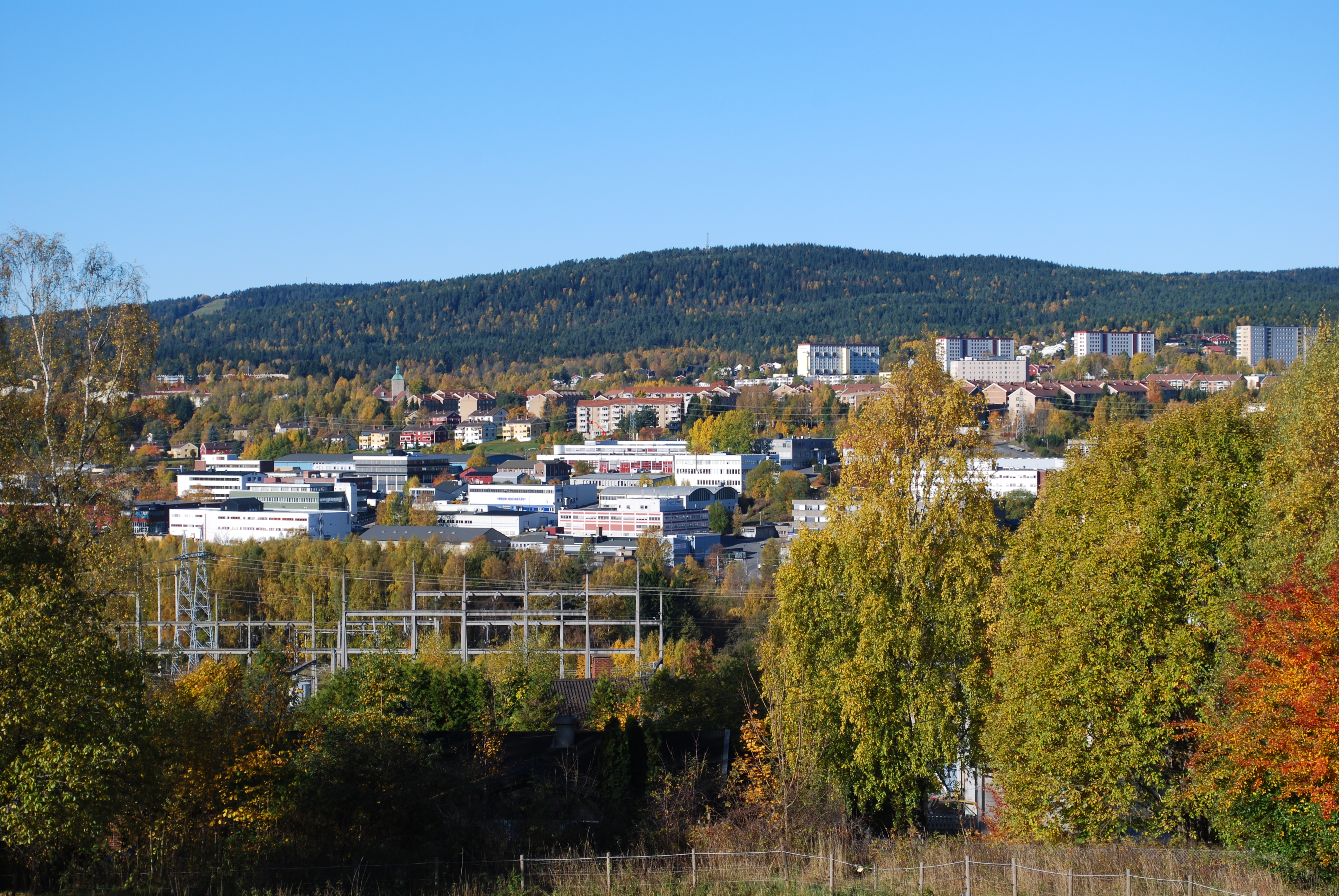 Furuset kulturpark, Oslo, utsikt fra utsiktstårnet nord i parken. Bredtvedt fengsel med tårn litt til venstre i bildet